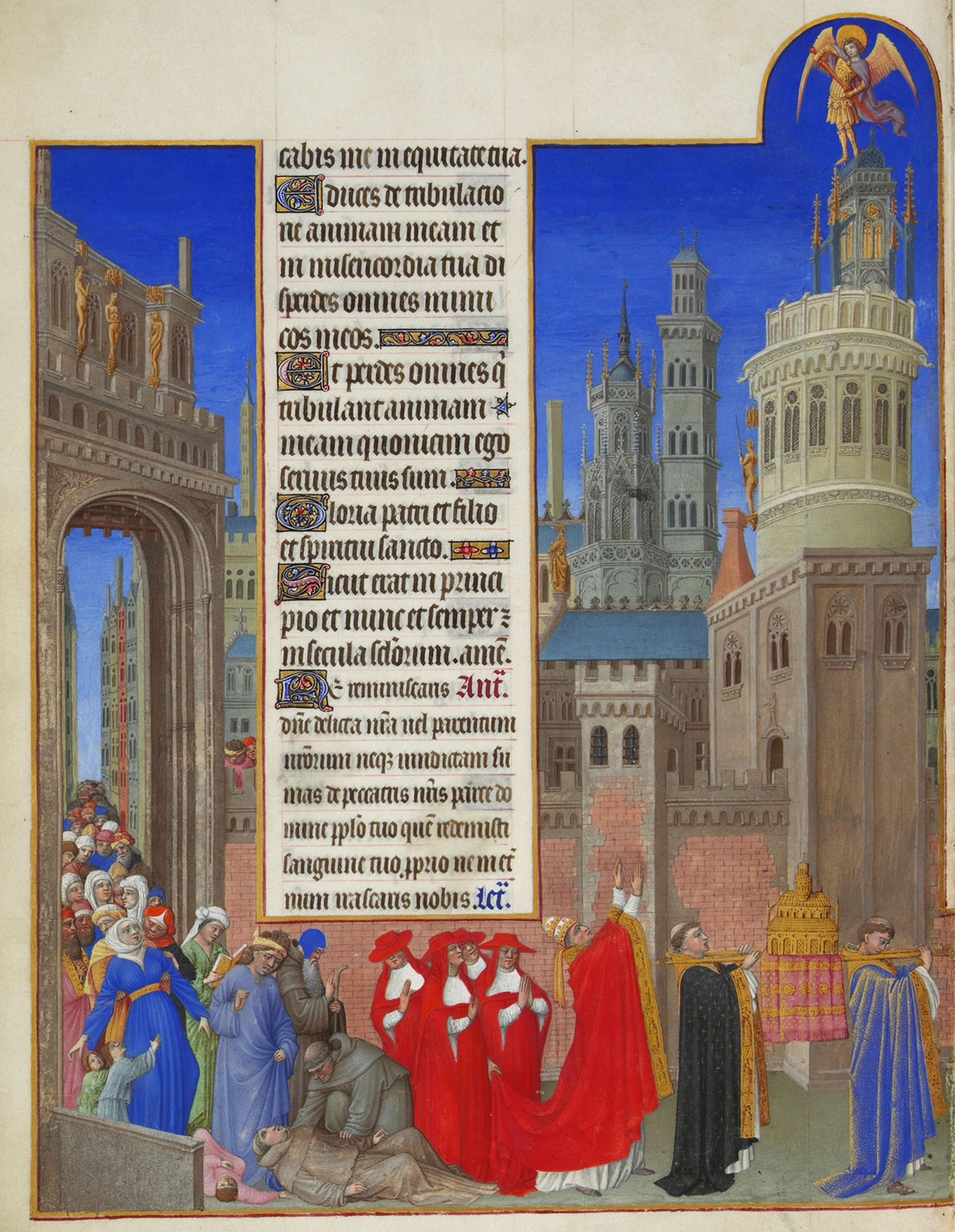 Sous le texte, une procession sort par d'une porte, devancé par une chasse, puis le pape Saint Grégoire qui voit apparaître au sommet du mausolée d'Hadrien un ange qui range son épée dans son fourreau, signe de la fin de l'épidémie de peste.